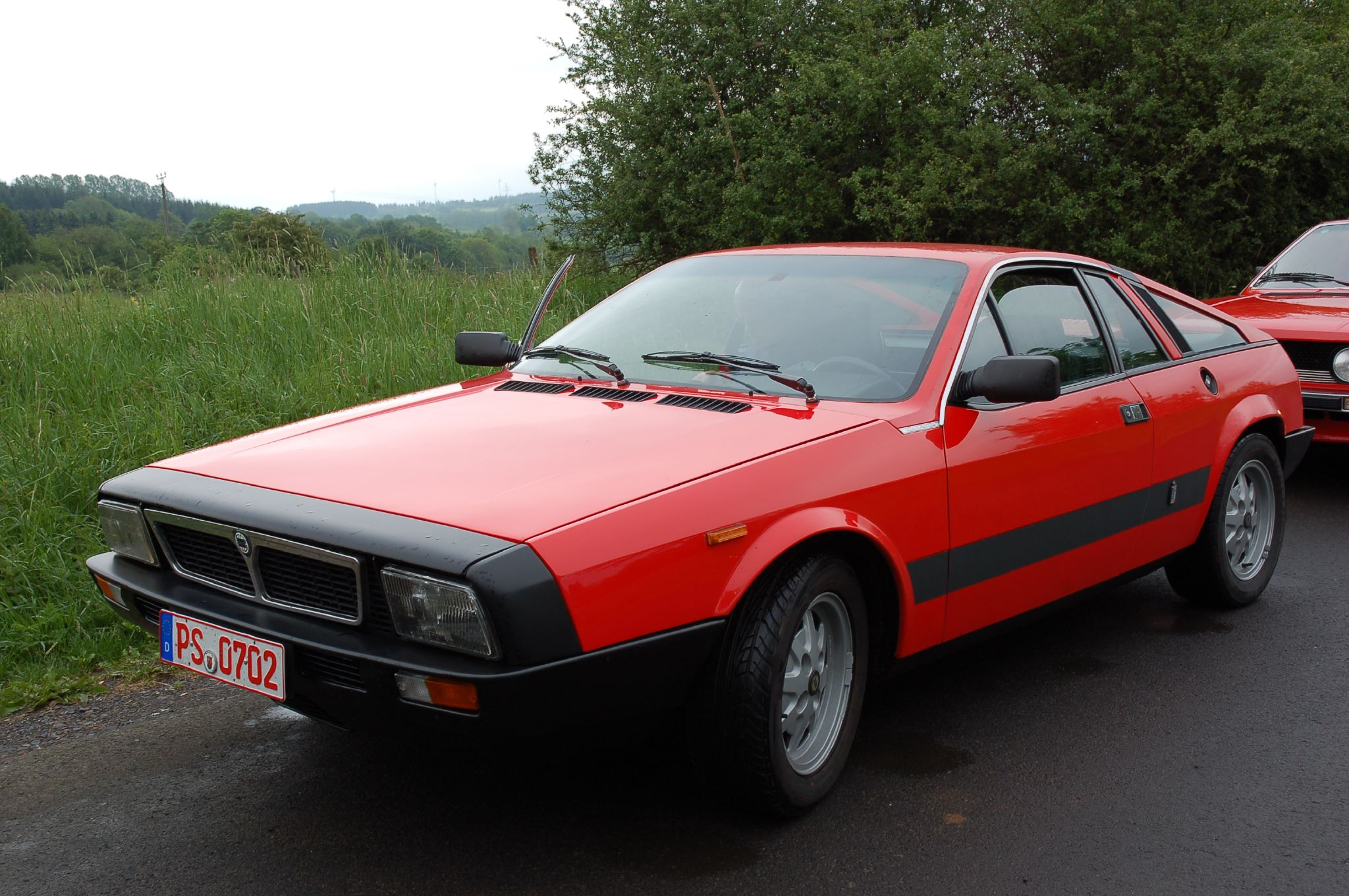 Lancia Montecarlo Coupé del 1984